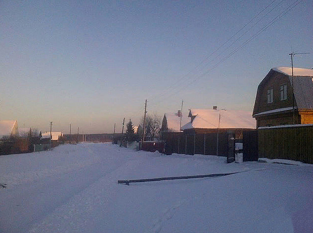 Деревня Карпово